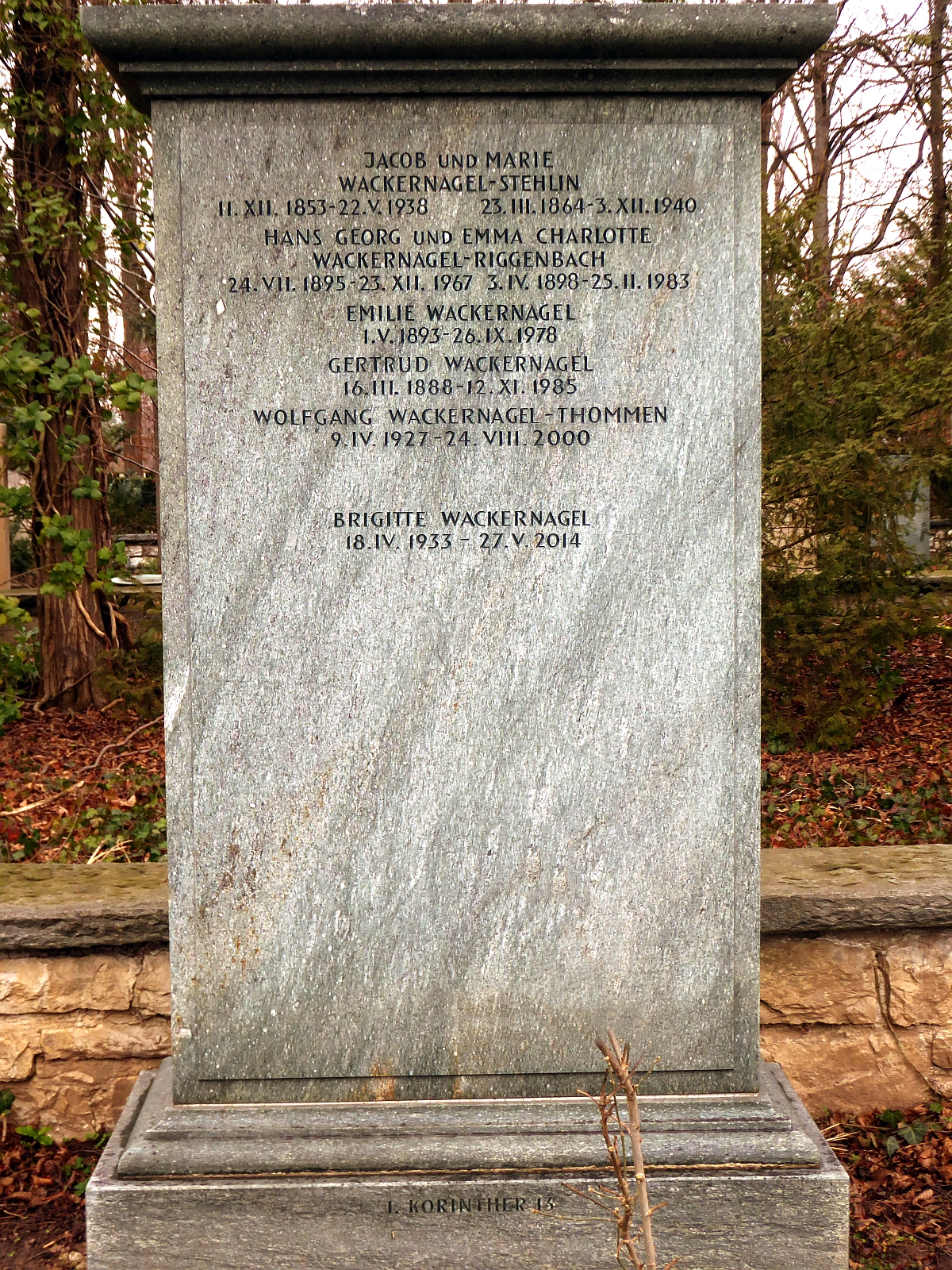 Jakob Wackernagel-Stehlin (1853–1938), Dr.phil., für Griechisch und Sanskrit, ao. Professor, bedeutendster „Sprachforscher der philologischen Richtung, Familiengrab auf dem Friedhof Hörnli, Riehen, Basel-Stadt